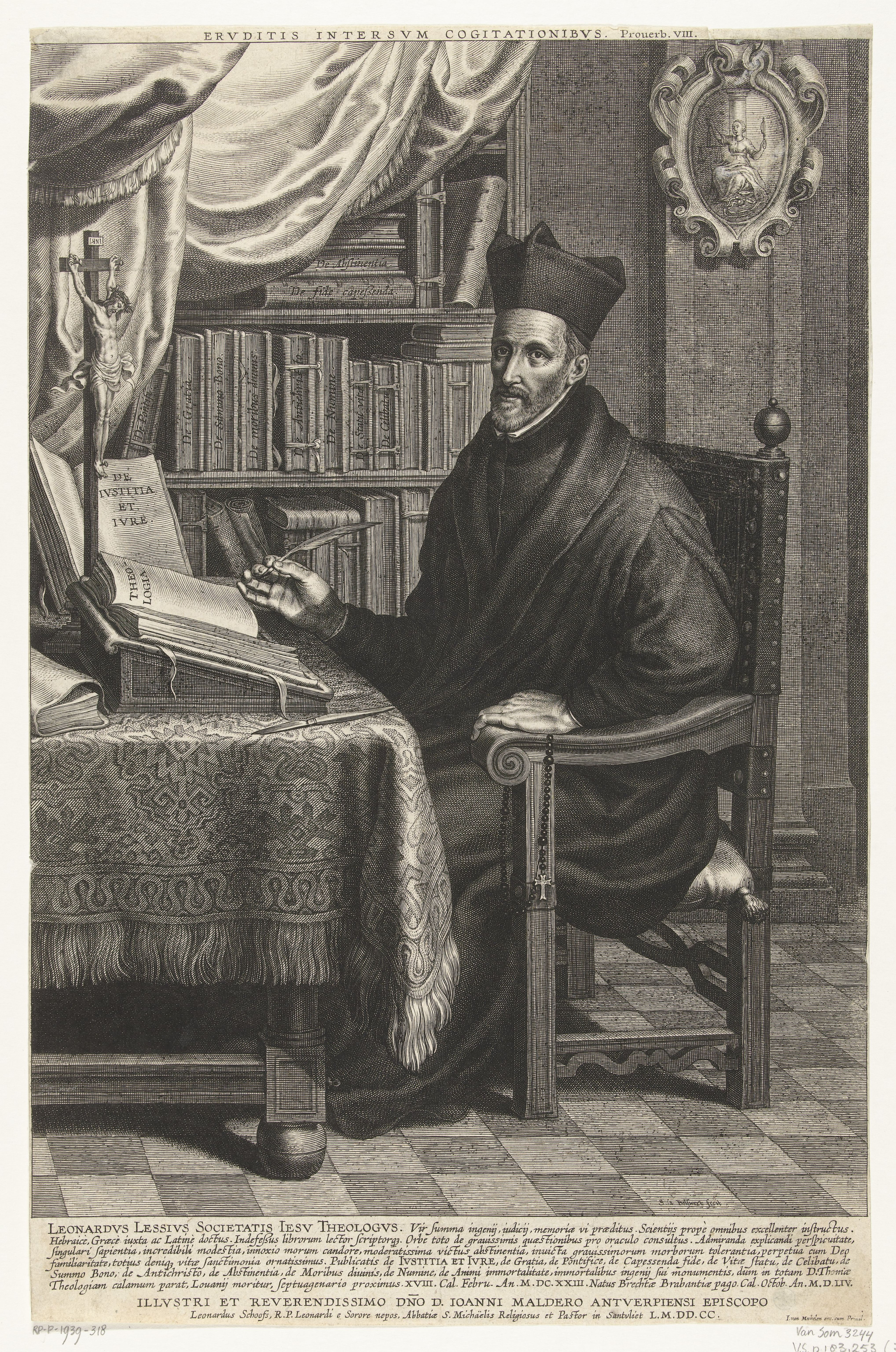 IdentificatieTitel(s): Portret van jezuïet Leonardus LessiusLeonardvs Lessivs Societatis Iesv Theologvs (titel op object)Objecttype: prent Objectnummer: RP-P-1939-318Catalogusreferentie: Hollstein Dutch 384Van Someren 3244Opschriften / Merken: opschrift, recto onder, gegraveerd: ‘Vir summa ingenij, ... pago Cal. octob. An. M.D.LIV.’verzamelaarsmerk, verso linksonder, gestempeld: Lugt 151verzamelaarsmerk, verso rechts, gestempeld: Lugt 2760verzamelaarsmerk, verso rechts, gestempeld: Lugt 2228Omschrijving: Portret van jezuïet Leonardus Lessius (Lenaert Leys) in zijn studeervertrek. De man zit aan een tafel en schrijft een boek. Boven het portret staat een bijbeltekst: Eruditis Intersum cogitationibus (Spreuken 8, wijsheid schuilt in geleerde gedachten). Onder de voorstelling staat een opsomming van gedenkWaar: dige feiten betreffende deze theoloog.VervaardigingVervaardiger: prentmaker: Boëtius Adamsz. Bolswert (mogelijk)prentmaker: Schelte Adamsz. Bolswert (vermeld op object)uitgever: Jan van Mechelen (vermeld op object)Datering: 1623Fysieke kenmerken: gravureMateriaal: papier Techniek: graveren (drukprocedé)Afmetingen: blad: h 398 mm × b 258 mmOnderwerpWat: theologian in his study (writing or reading)Wie: Leonardus LessiusVerwerving en rechtenCredit line: Aankoop uit het F.G. Waller-FondsVerwerving: aankoop apr-1939Copyright: Publiek domein